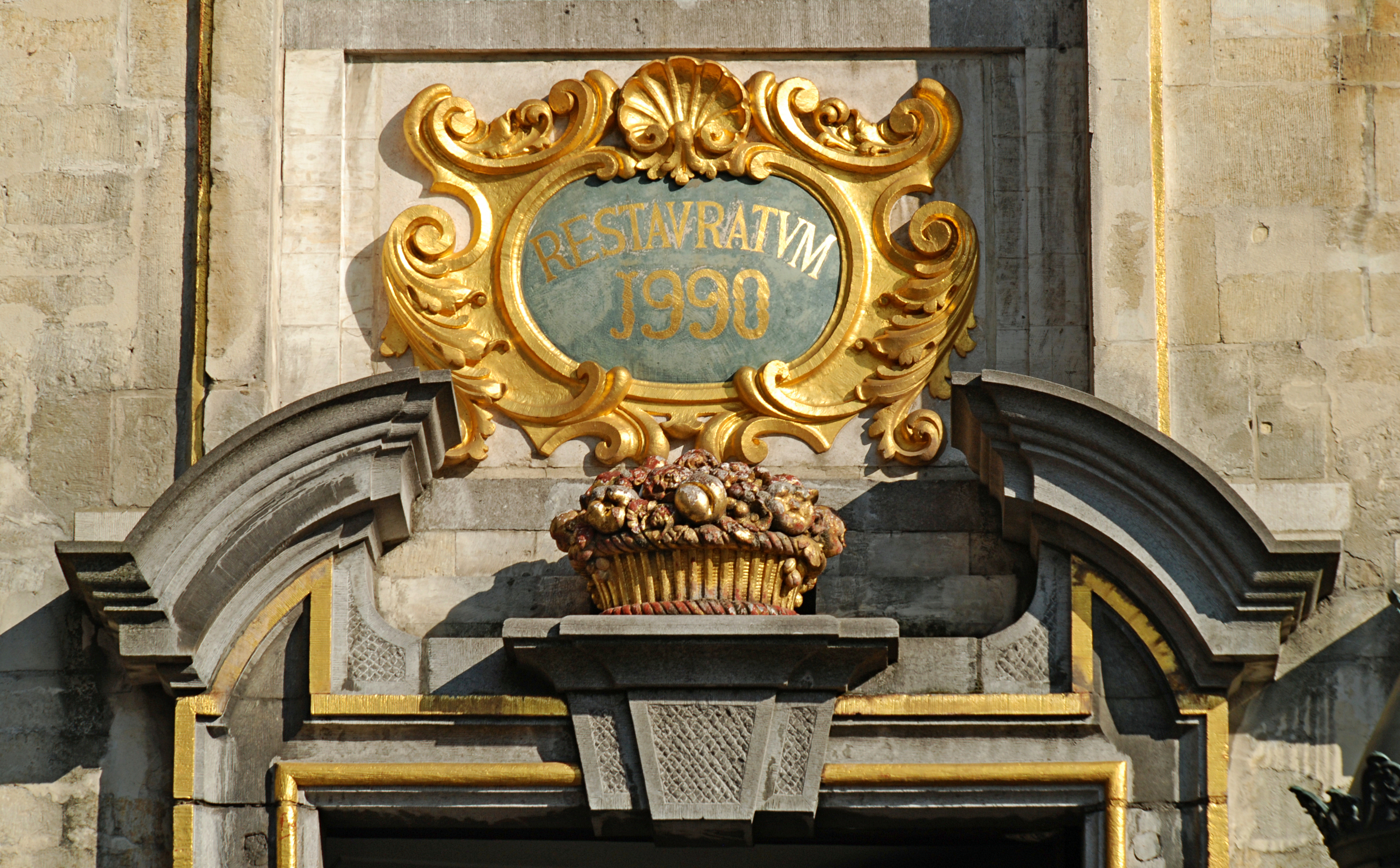 Belgique - Bruxelles - Grand-Place - Maison de la Bourse